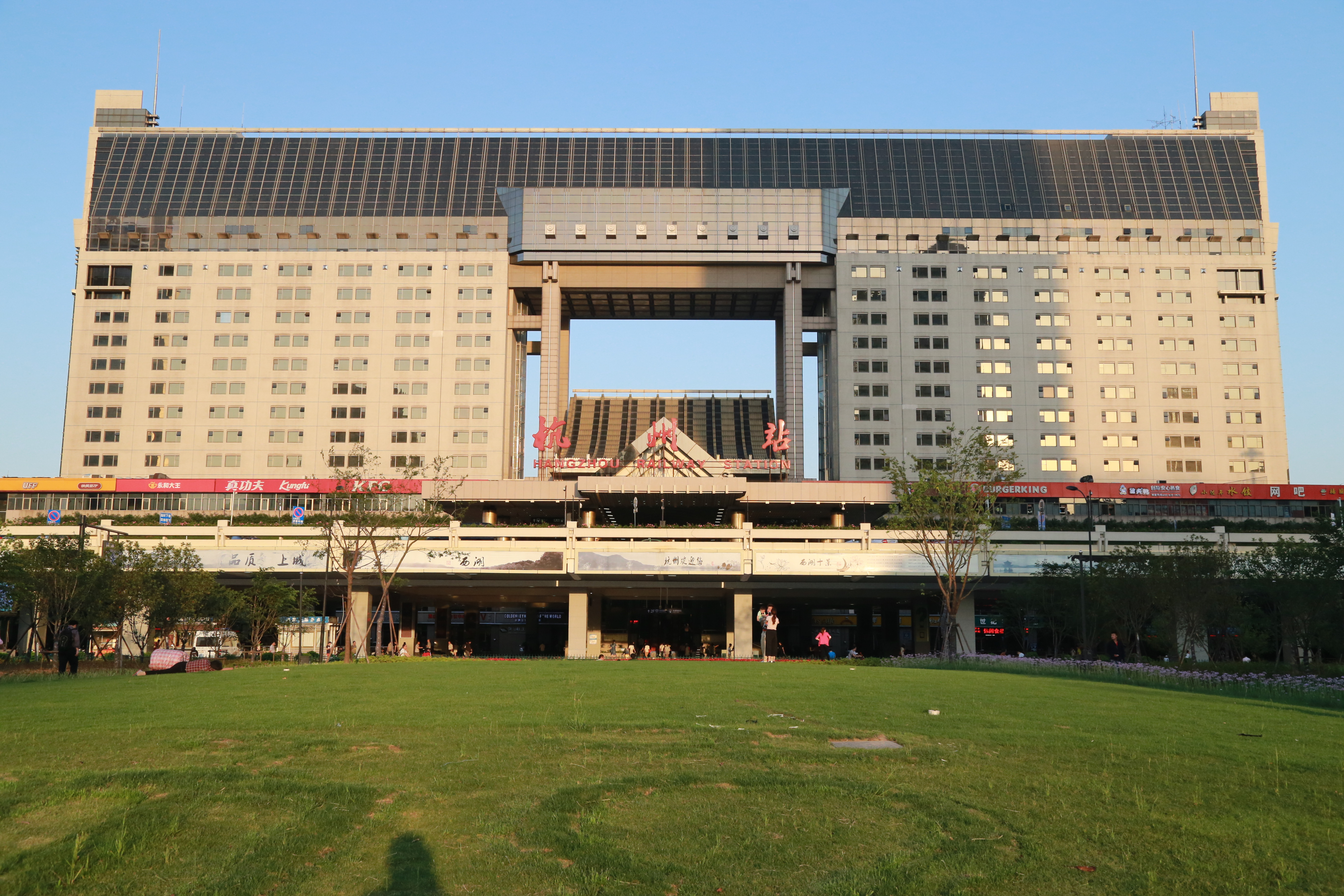 城站火车站更新改造后正面